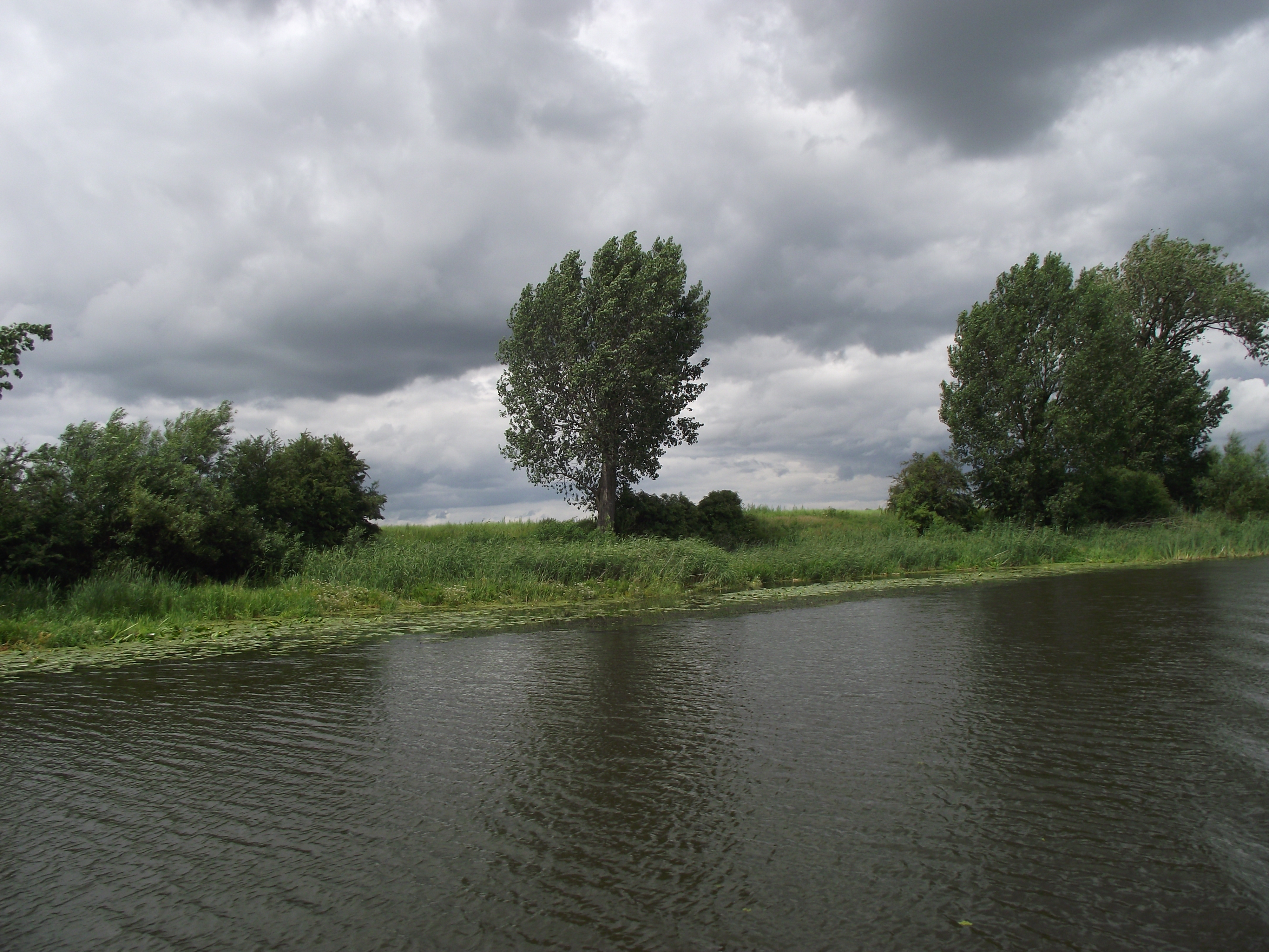 Nogat